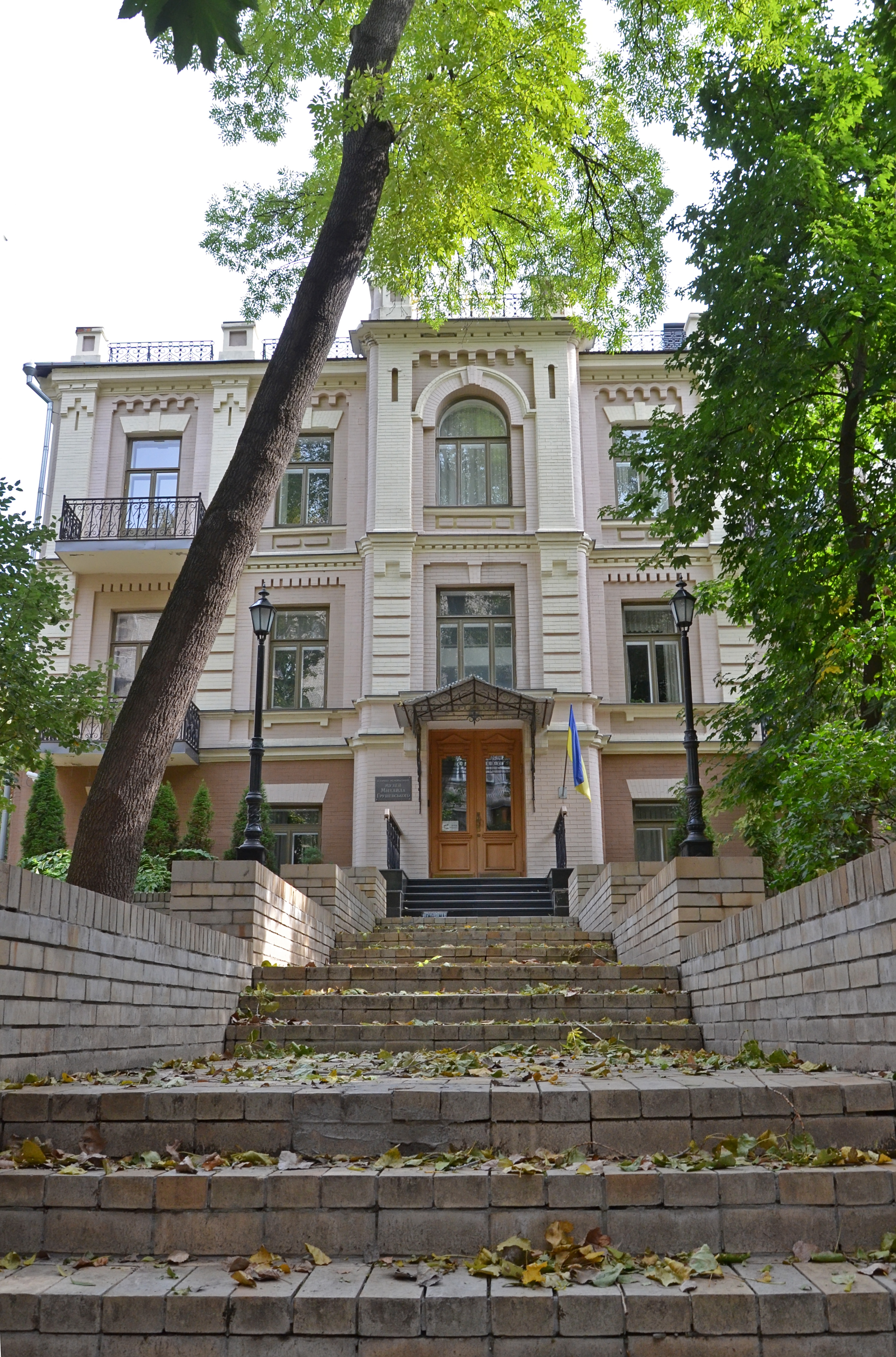 Будинок, в якому мешкали: у 1918–1948 роках родина Грушевських, істориків, громадських та культурних діячів; у 1918–1923 роках — А. Г. Петрицький, живописець, художник театру, педагог та ін., Київ, Паньківська вул., 9